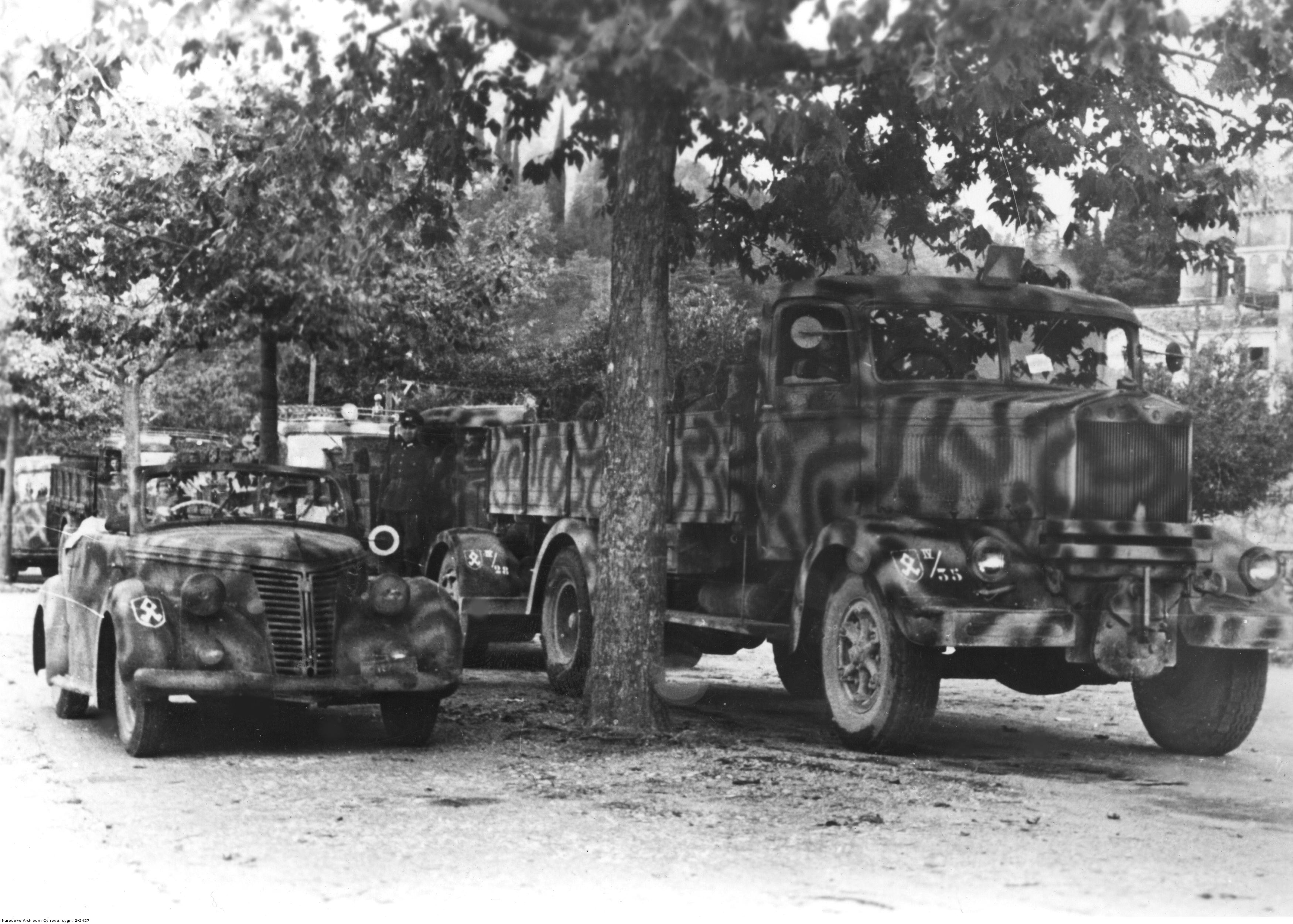 Kolumna samochodów z zaopatrzeniem podczas postoju - 7. Ochotnicza Dywizja Górska SS Prinz Eugen.